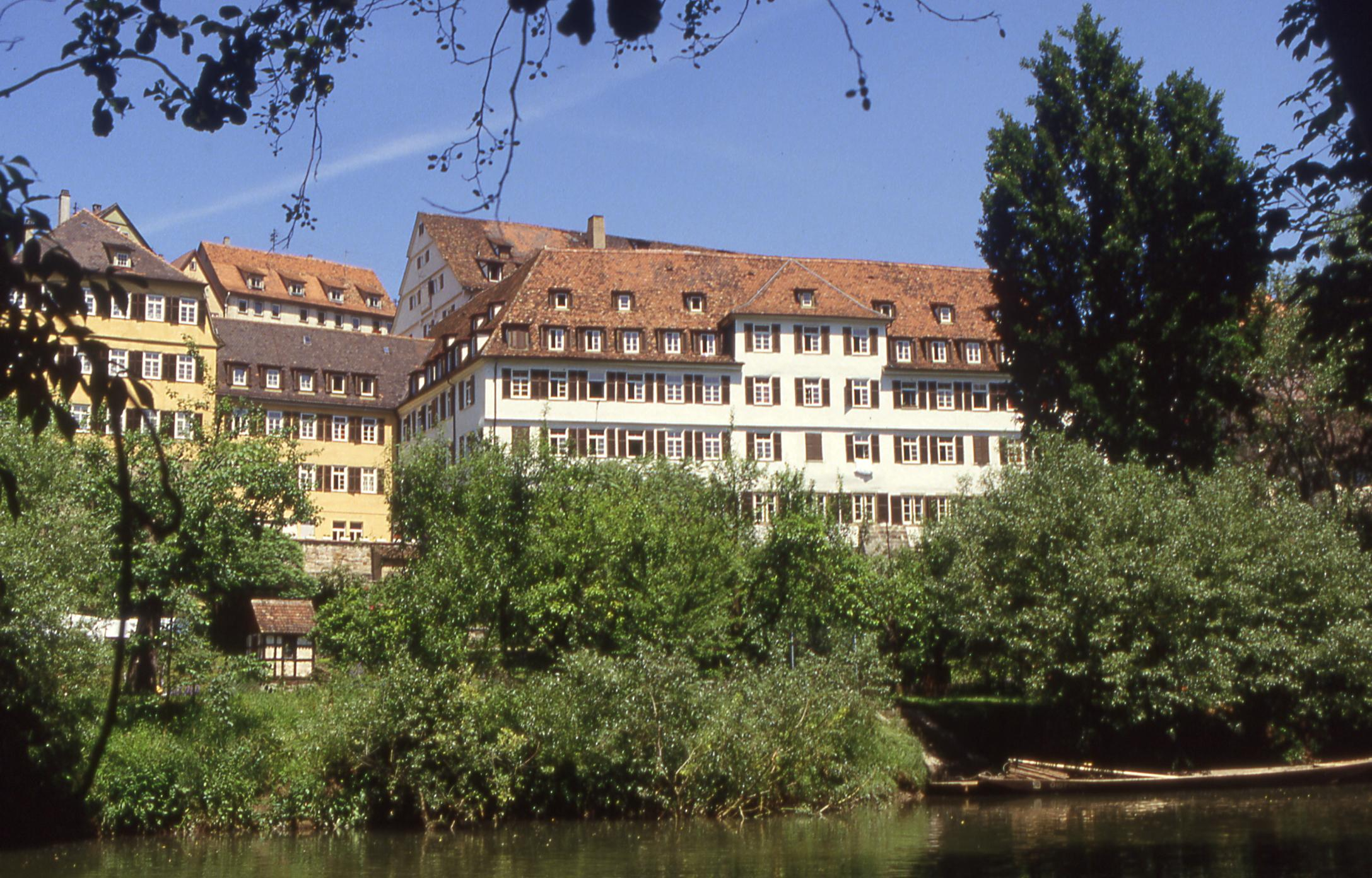 Evangelisches Stift zu Tübingen vom Neckar aus gesehen.